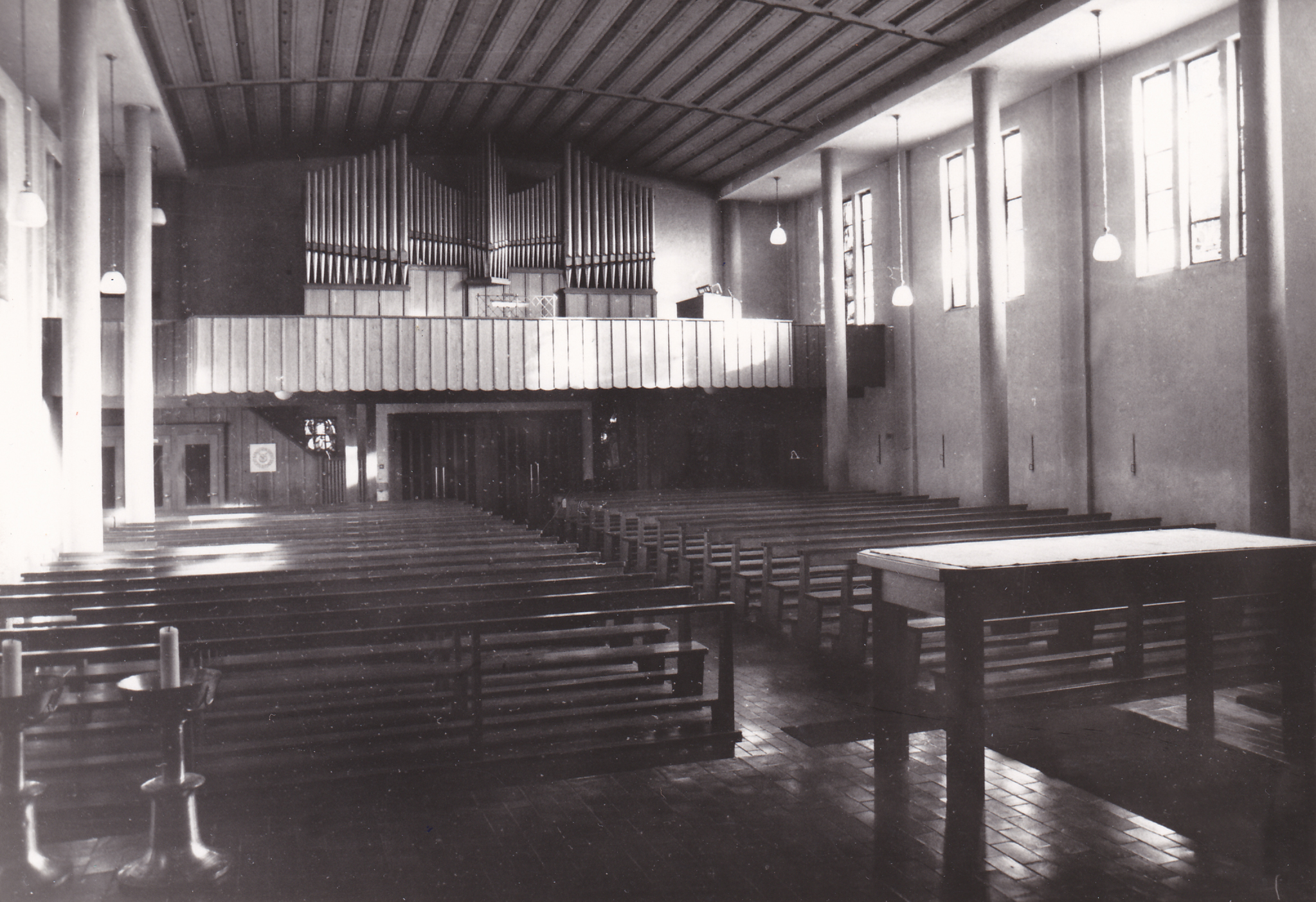 Römisch-katholische Pfarrkirche Heilig Geist von 1940